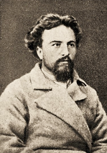 Dmitrij Michajlovič Rogačëv